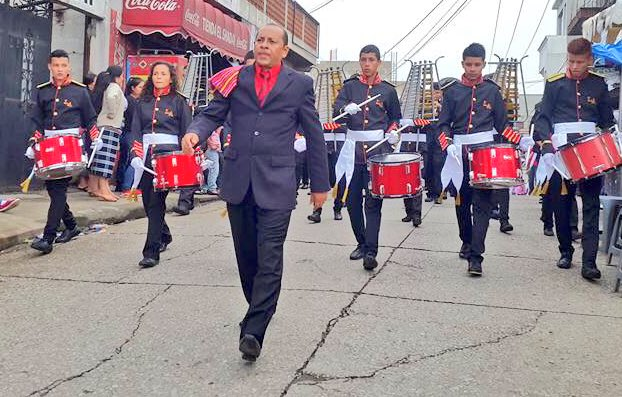 Integrantes de la Banda Marcial León Alvarado marchando del Instituto Departamental León Alvarado